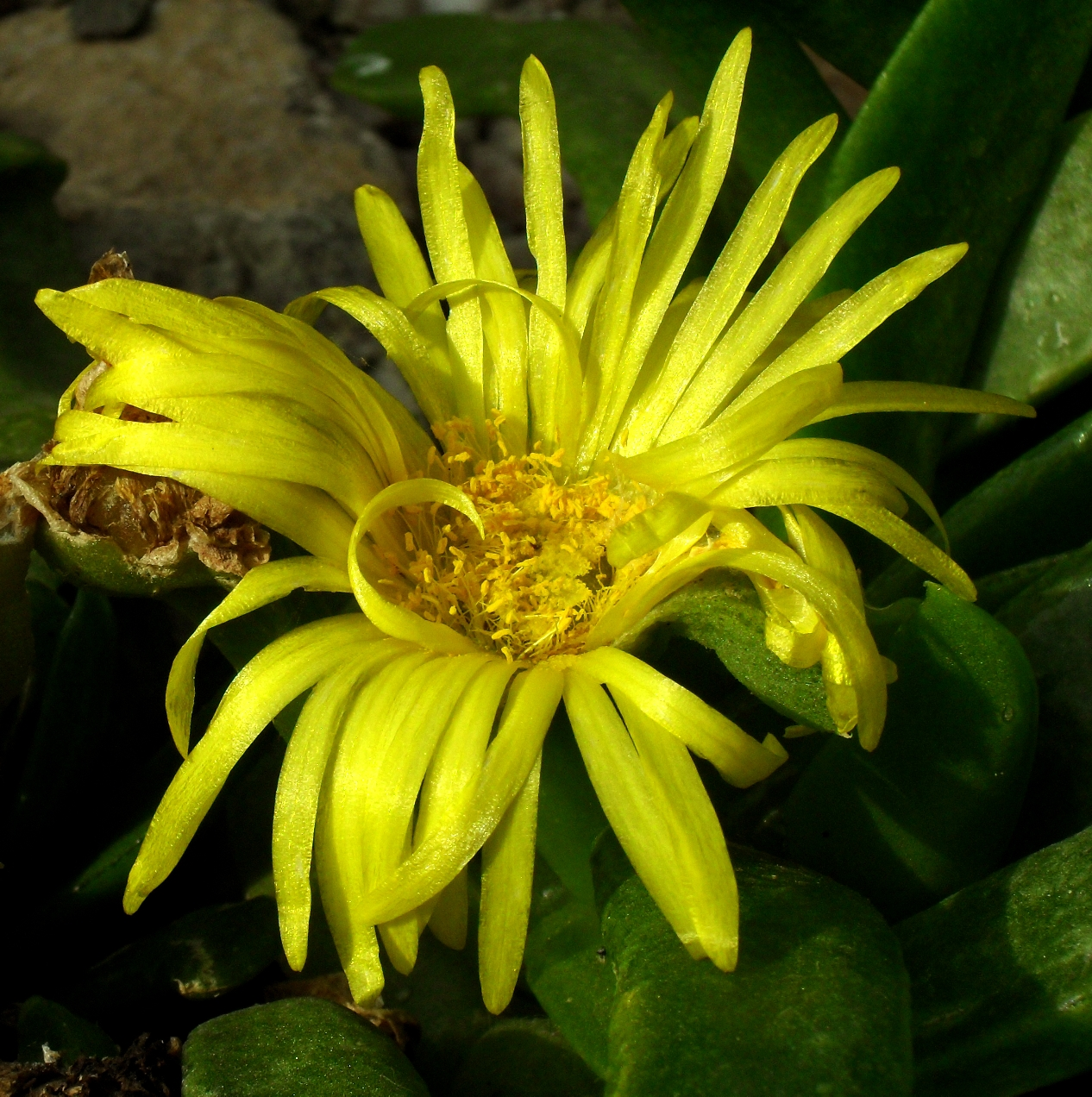 Glottiphyllum depressum - Botanischer Garten Leipzig